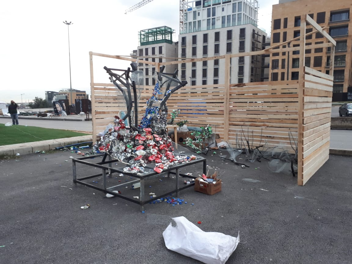 Reste einer Installation auf dem Beiruter Märtyrerplatz im Rahmen der Proteste im Libanon